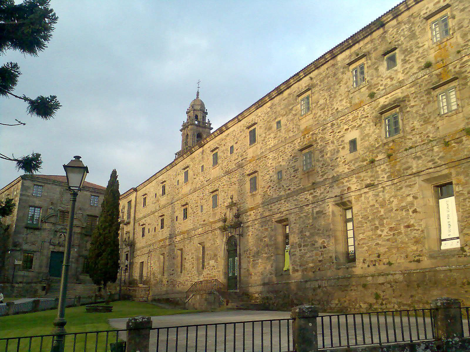 Fachada principal de San Domingos de Bonaval - Santiago de Compostela